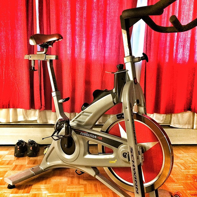 Schwinn Fitness Bike